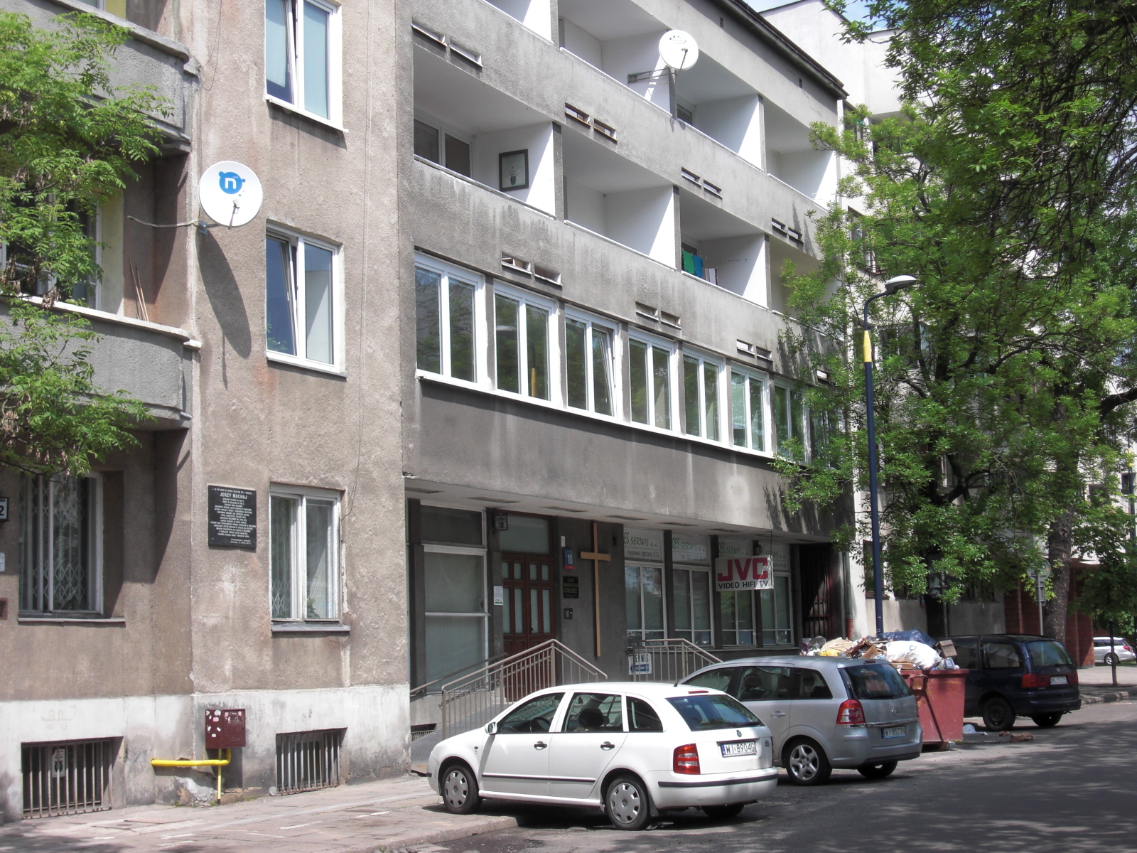 ul. Zagórna 10